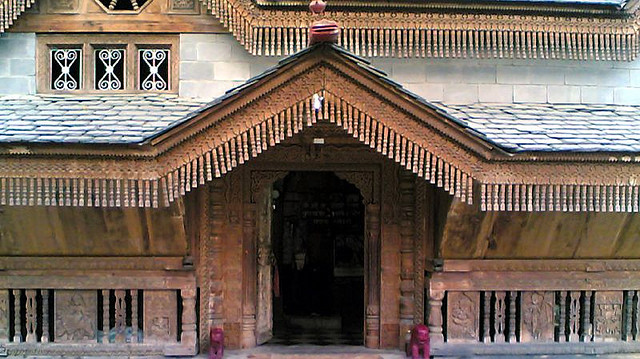 Front view: Kamaksha Temple, Karsog H.P.